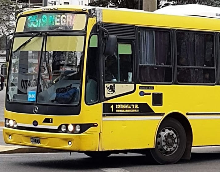 Interno de la línea 35/9 ramal "negro" en el centro de la ciudad de Rosario.